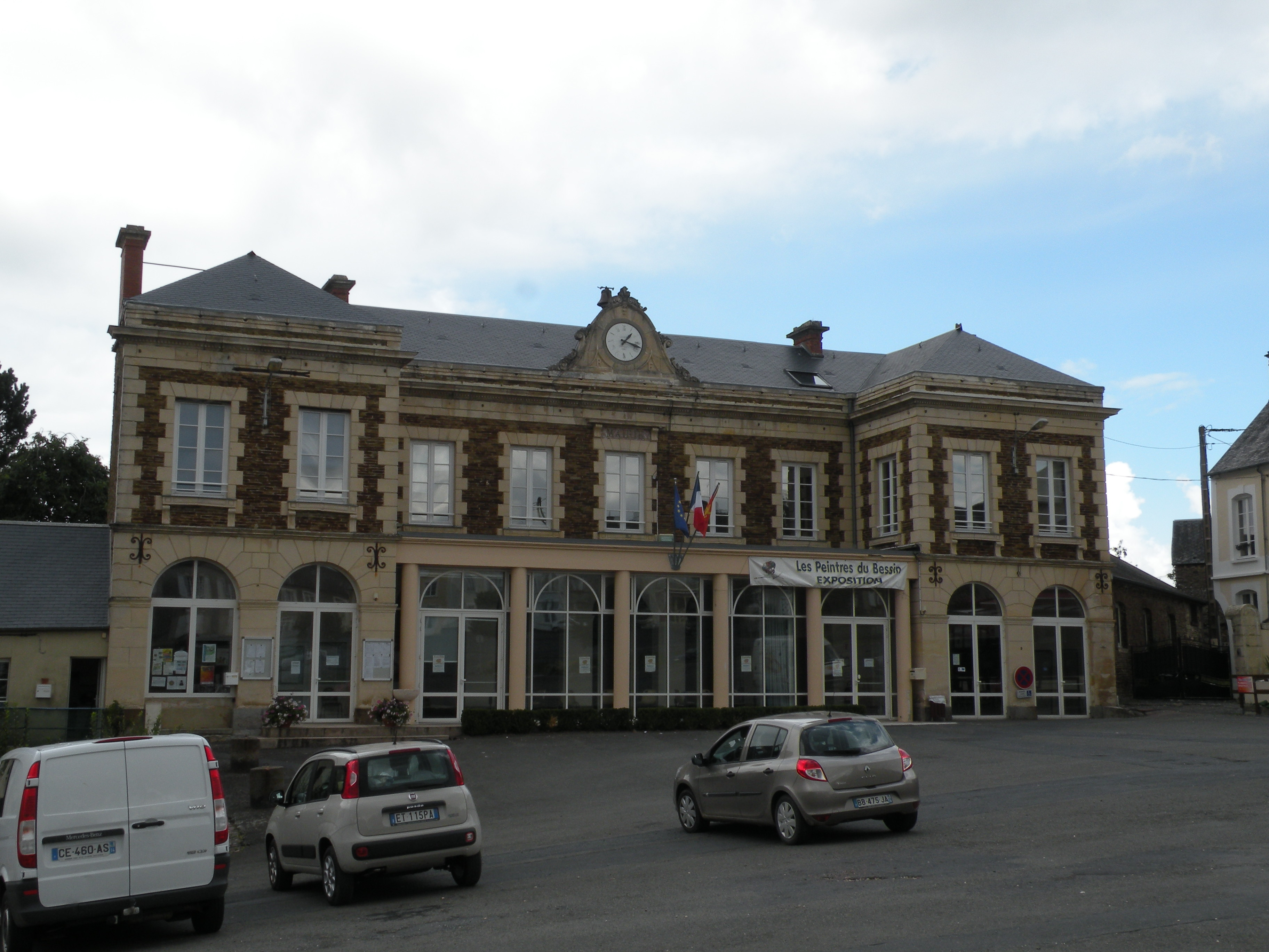 Balleroy mairie